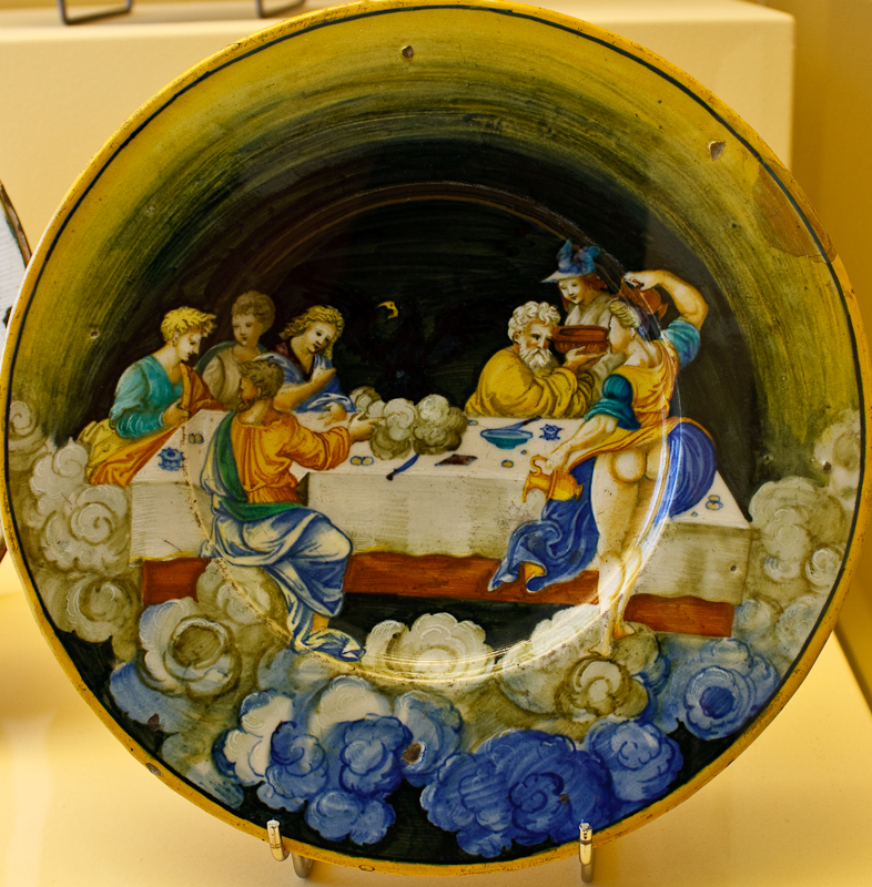 Istoriato schotels (Toegepaste kunst en Design, zaal 42) Italie Toegeschreven aan Nicola da Urbino Schotel: de maaltijd der Goden op de Olympus, 1530 Majolica, Istoriatostijl Schenking collectie: Mr. J.W. Frederiks 1994 T7 (KN&V) Italy Attributed to Nicola da Urbino Dish: The food of the gods on Olympus, 1530 Majolica, Istoriato style Donation collection: Mr. J.W. Frederiks 1994 T7 (KN & V)